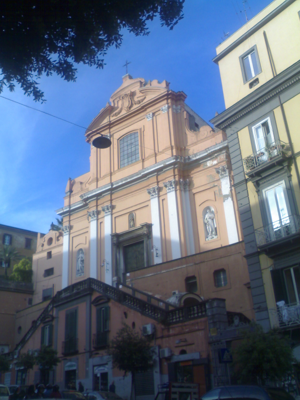 Facciata della chiesa di Santa Teresa al Museo (Napoli)